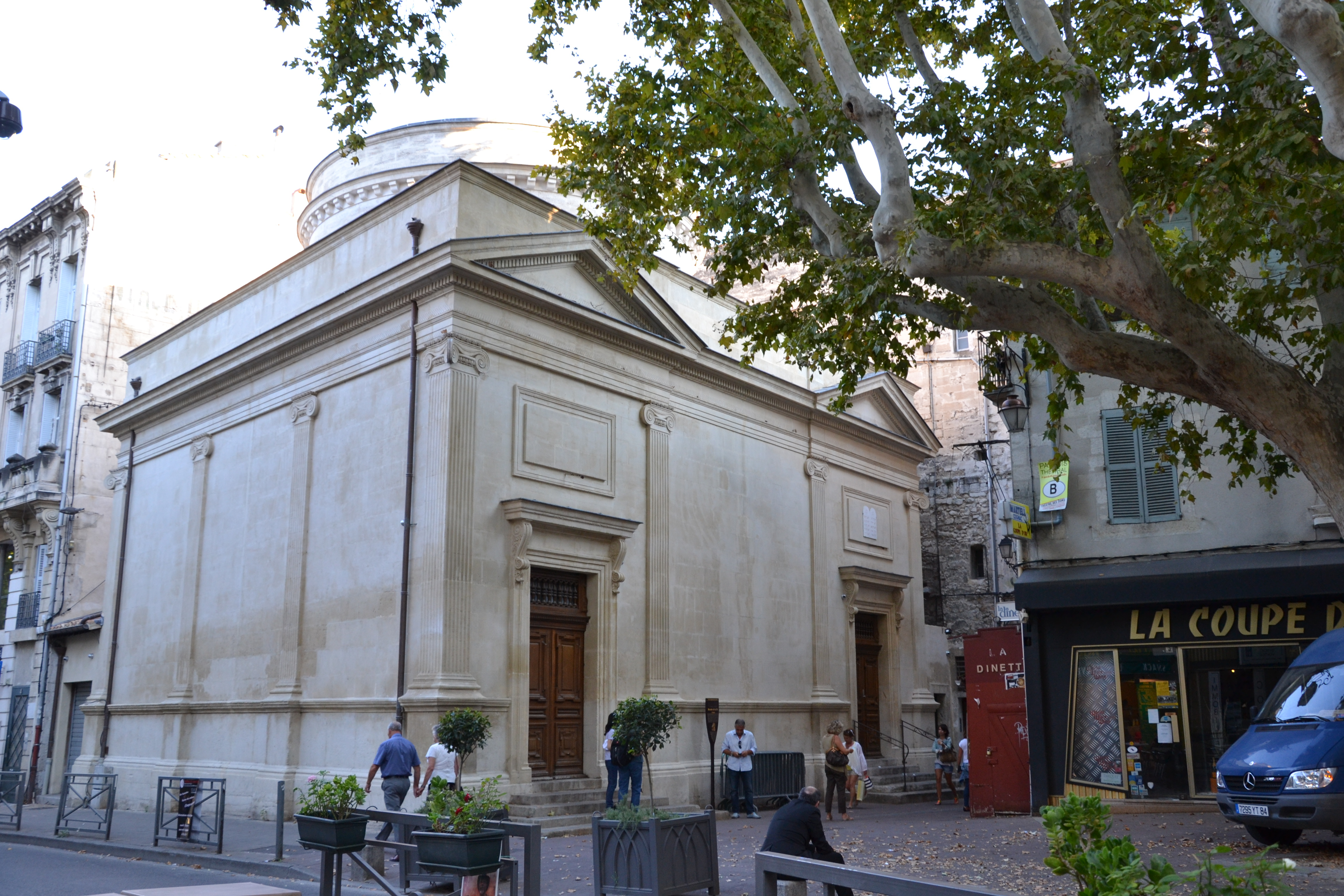 Synagoguedécor intérieur (Classé) .